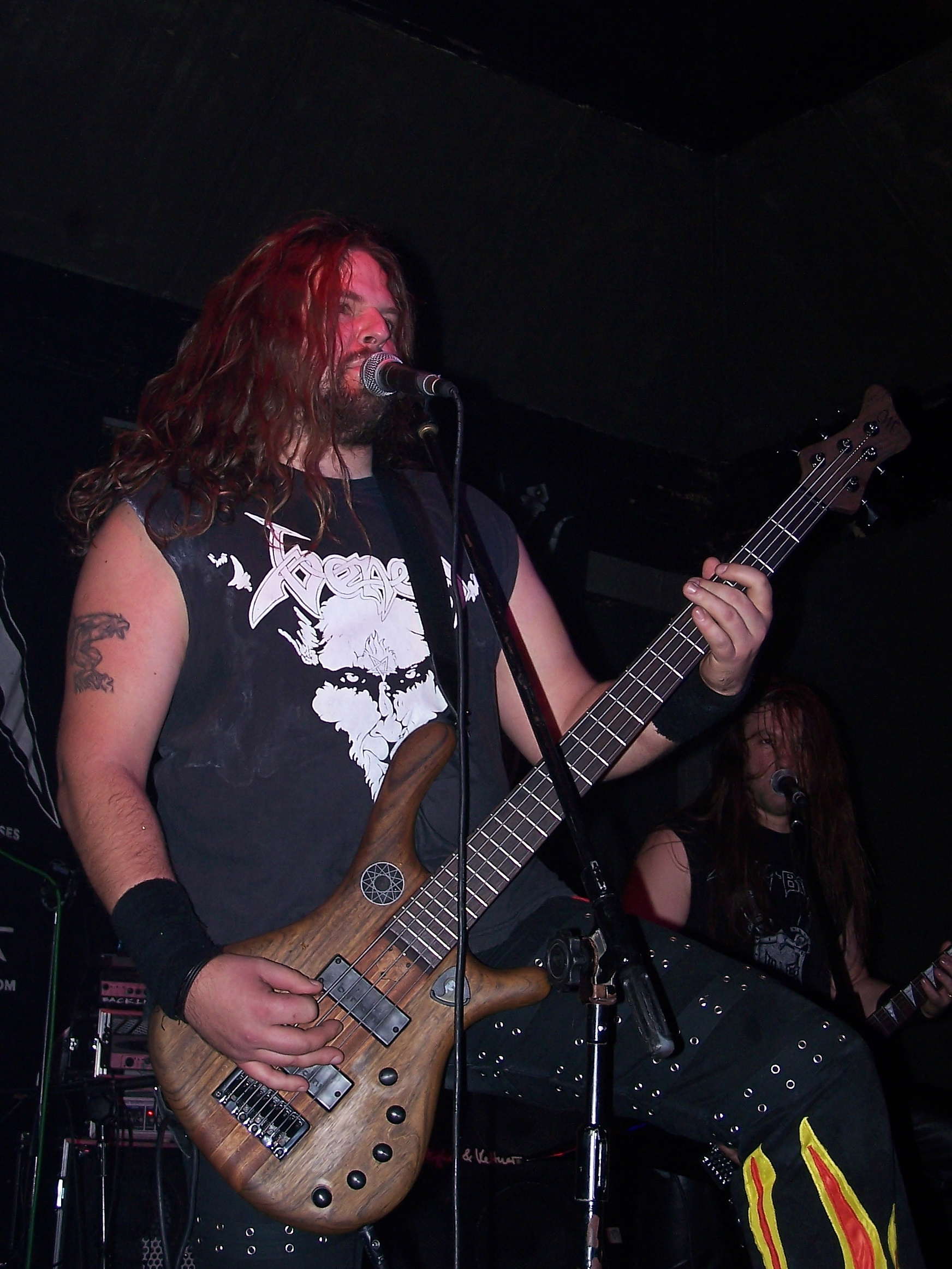 Baal Ravenlock - wokalista i basista zespołu Hell-Born podczas koncertu w katowickim Mega Clubie.